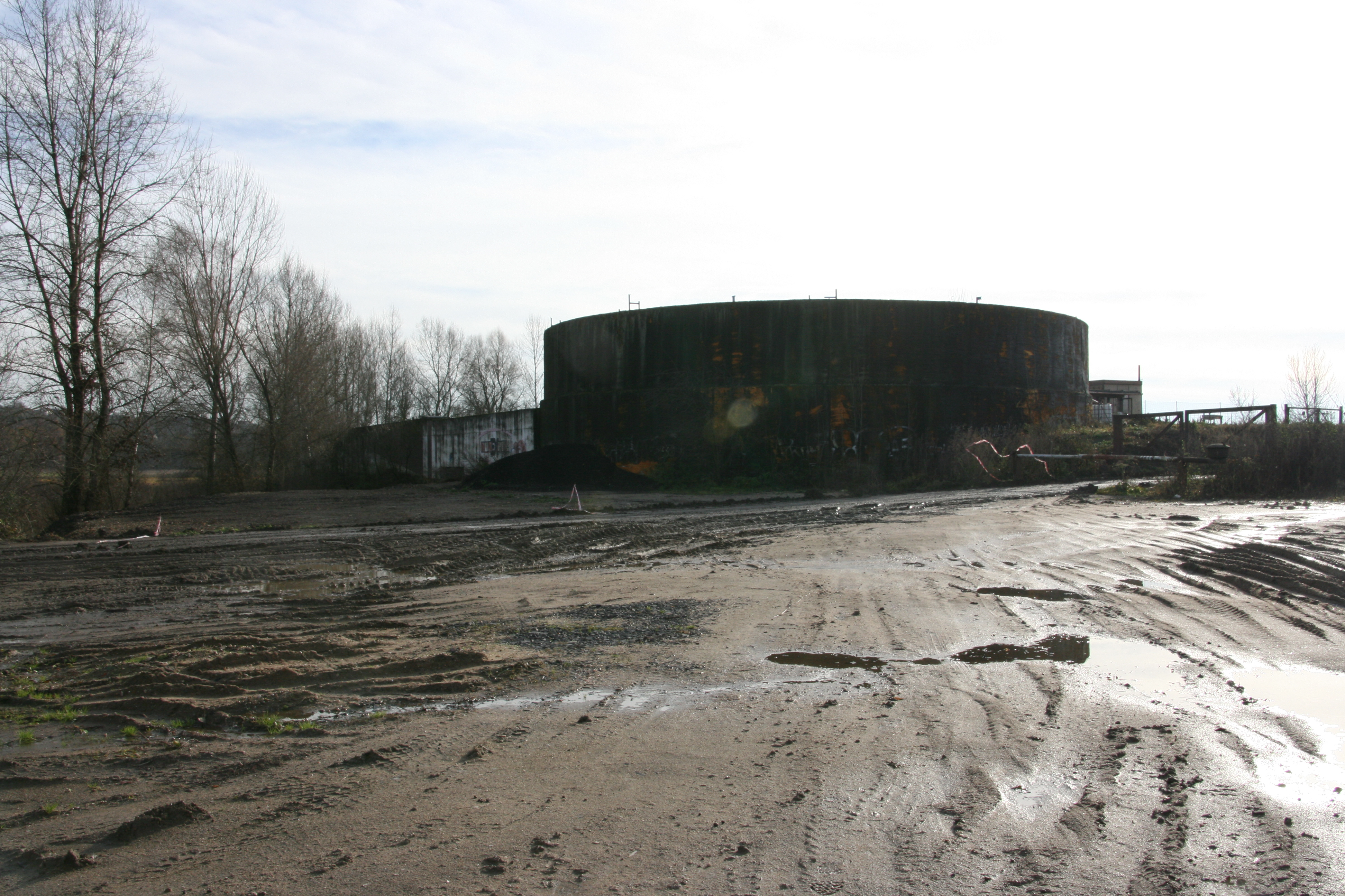 Zůstatky ČOV na Kelšticích